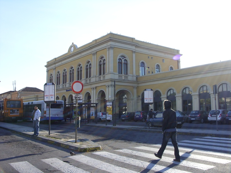 Fabbricato viaggitori della stazione di Catania